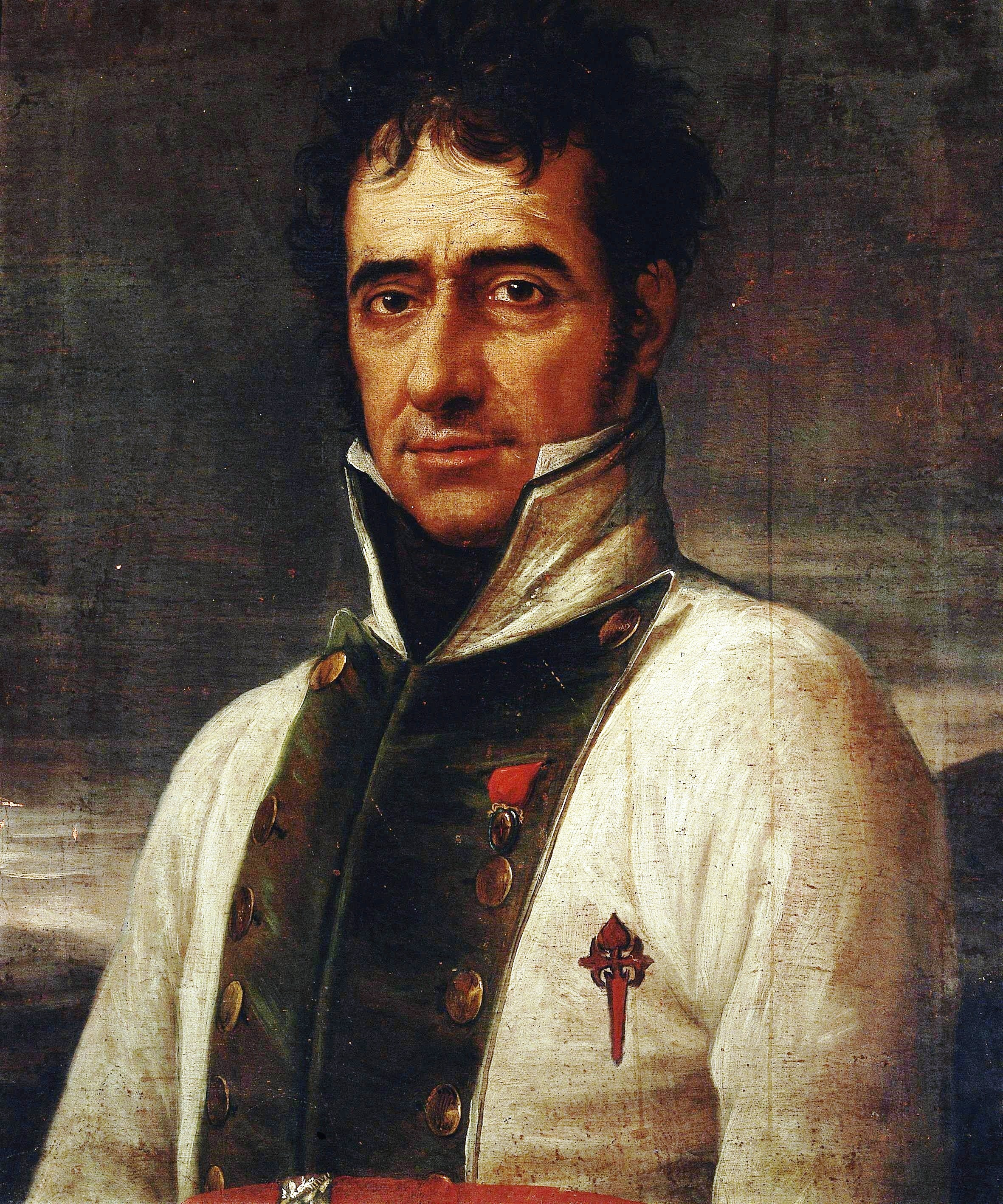 Retrato del militar y político español Tomás Moreno Daoíz (1765-1829), que llegó a ser mariscal de campo y caballero de la Orden de Santiago.